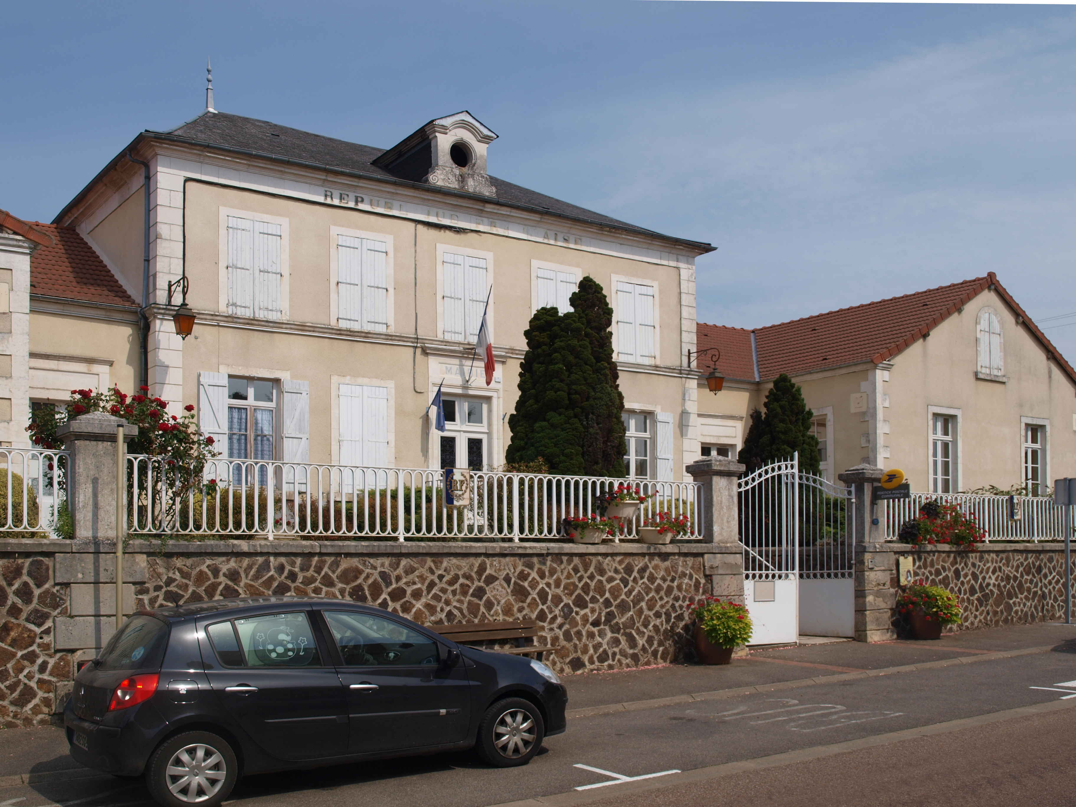 Arquian (Nièvre) ; la mairie